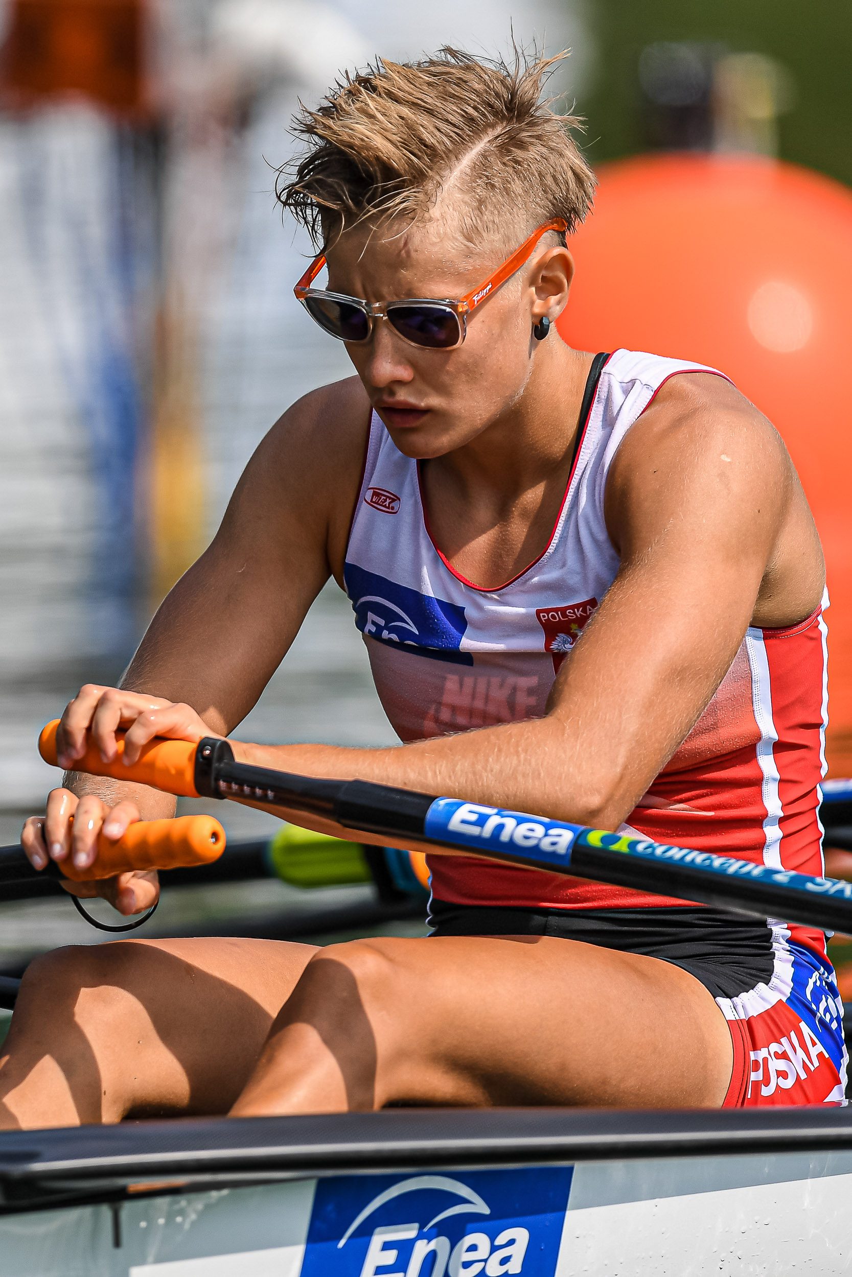 Polska wioślarka Katarzyna Zillmann na wodzie 2019